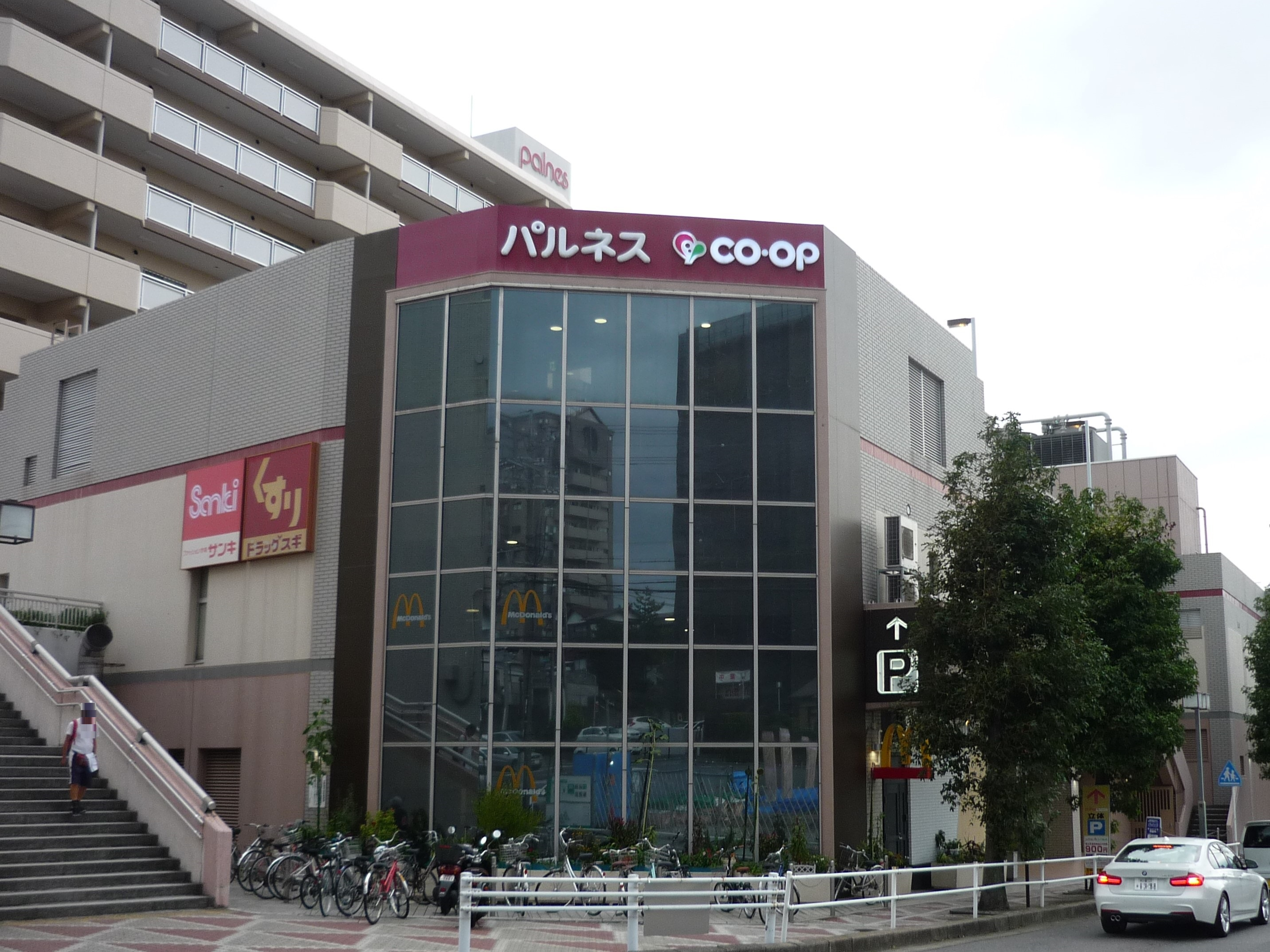 豊明市の前後駅前にある複合施設 パルネス前後1号館 Panasonic Lumix DMC-FS3